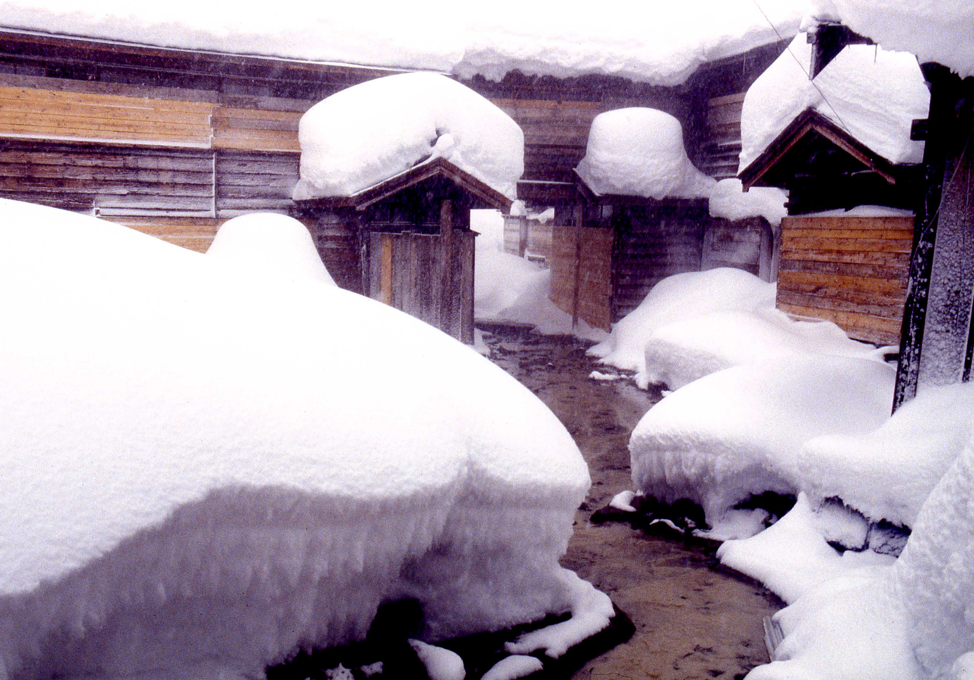 雪の黒湯温泉